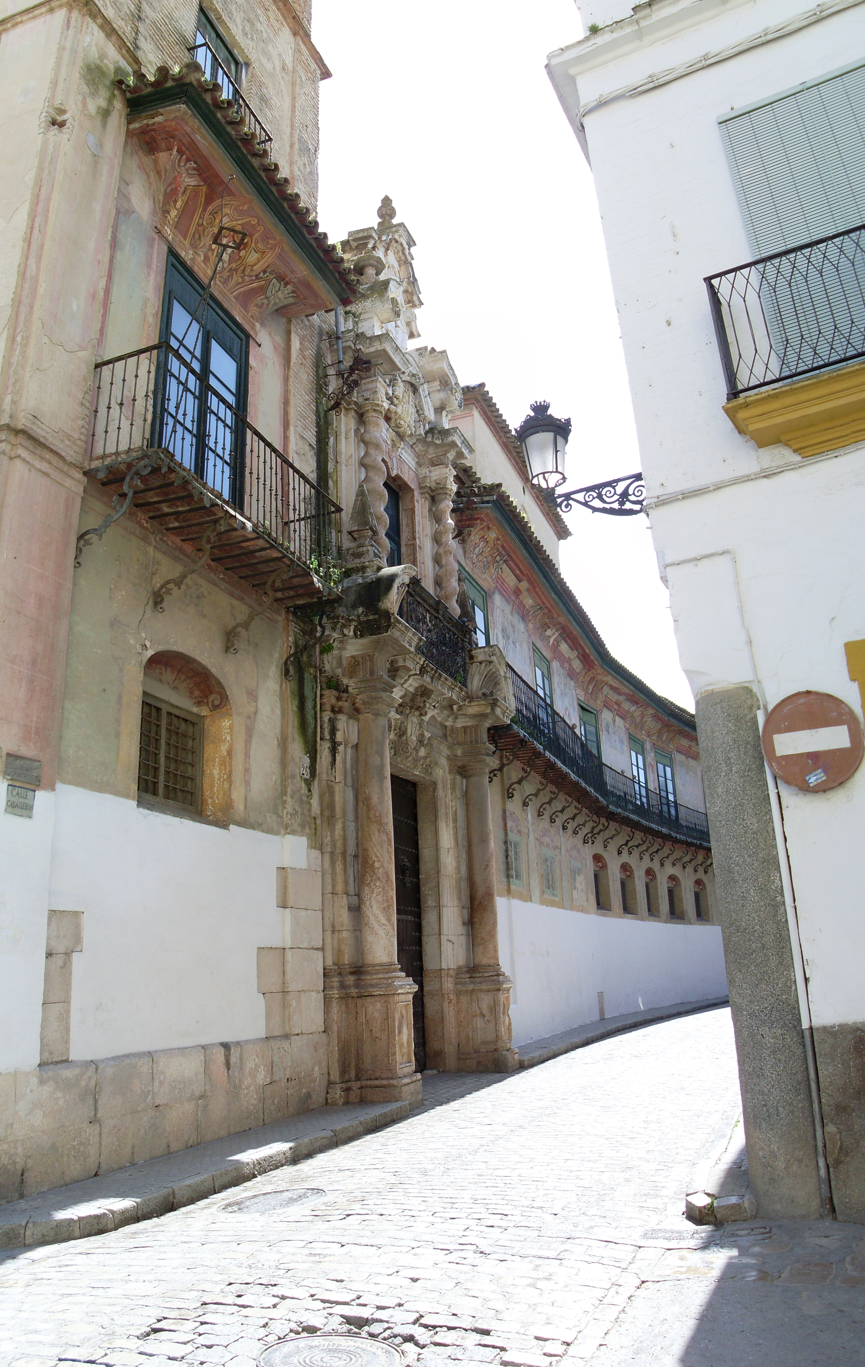 Porta del Palacio de Peñaflor de la ciudad de Écija.